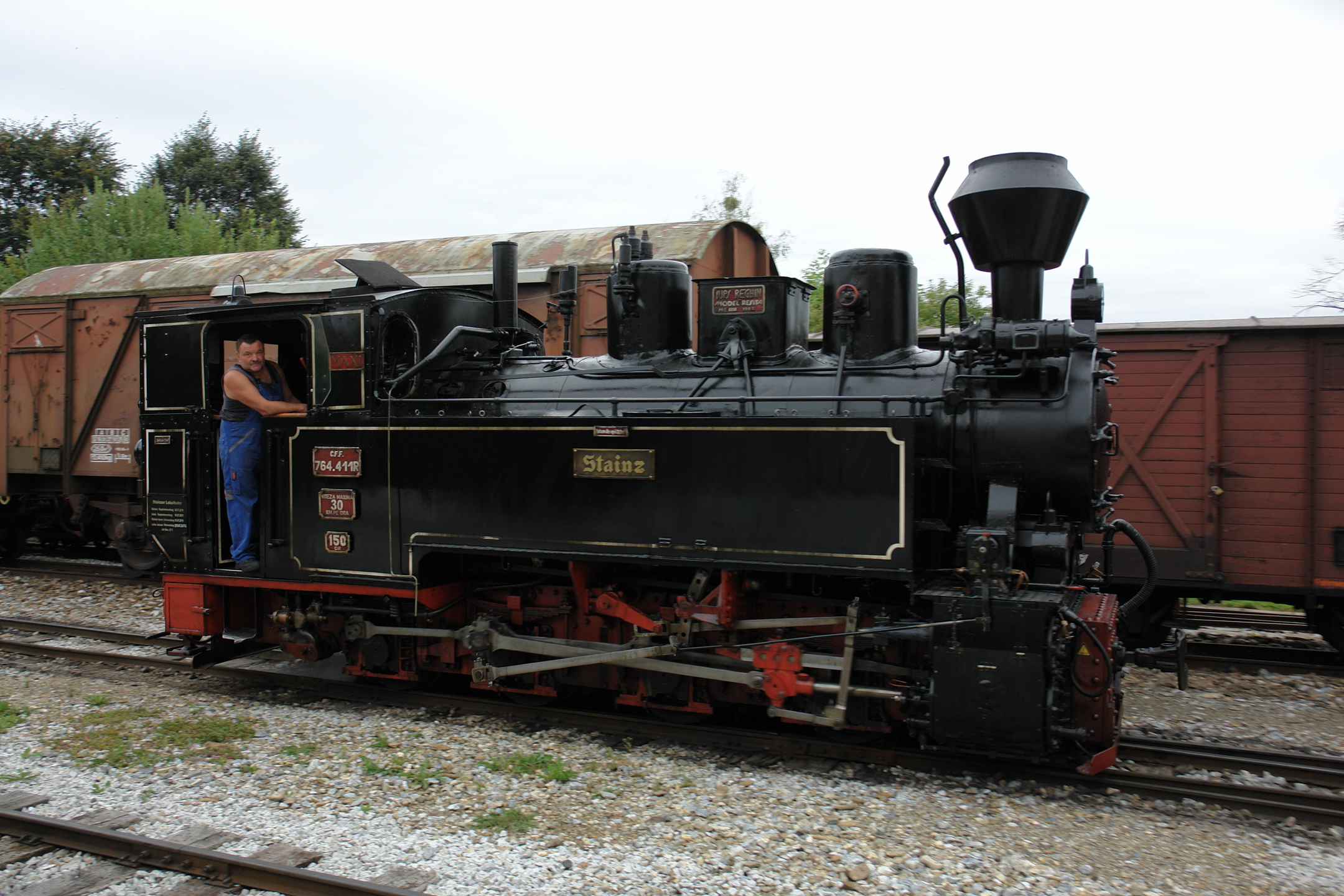 Stainzer Lokalbahn (Stainzer Flascherlzug)